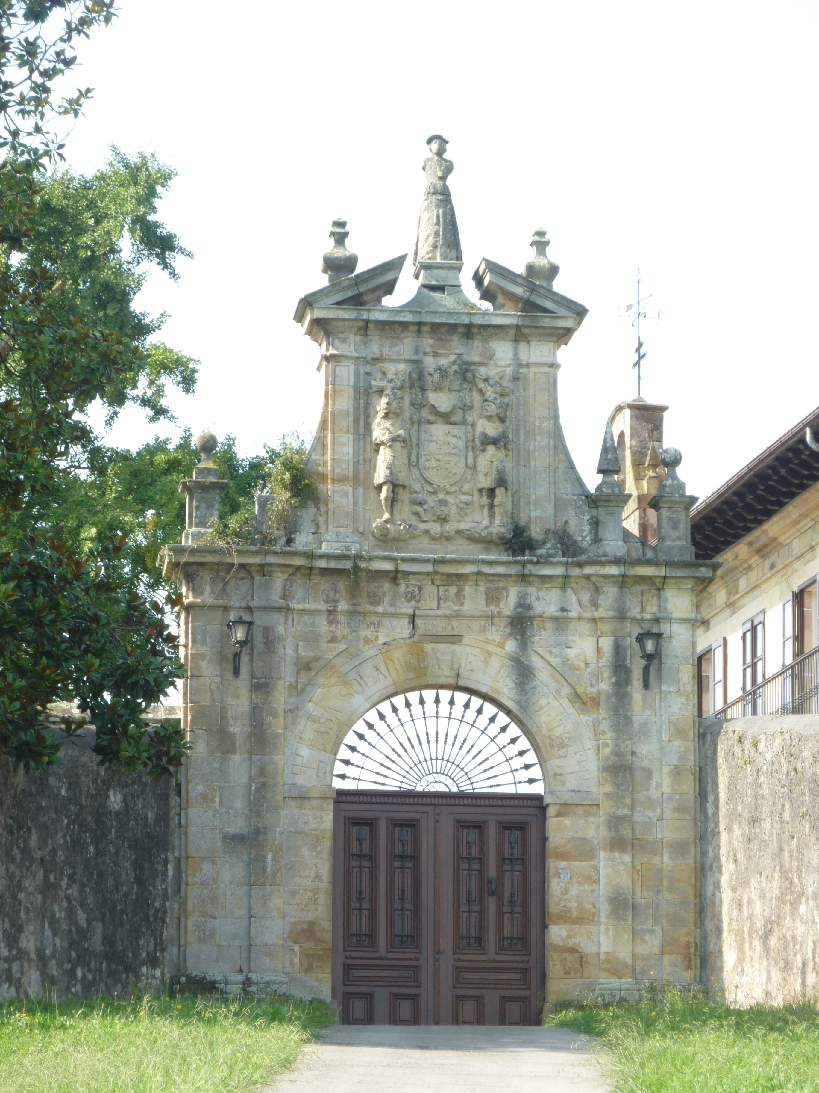 Casa Solariega de los Cuetos Sobremazas. Medio Cudeyo-Cantabria.Entrada